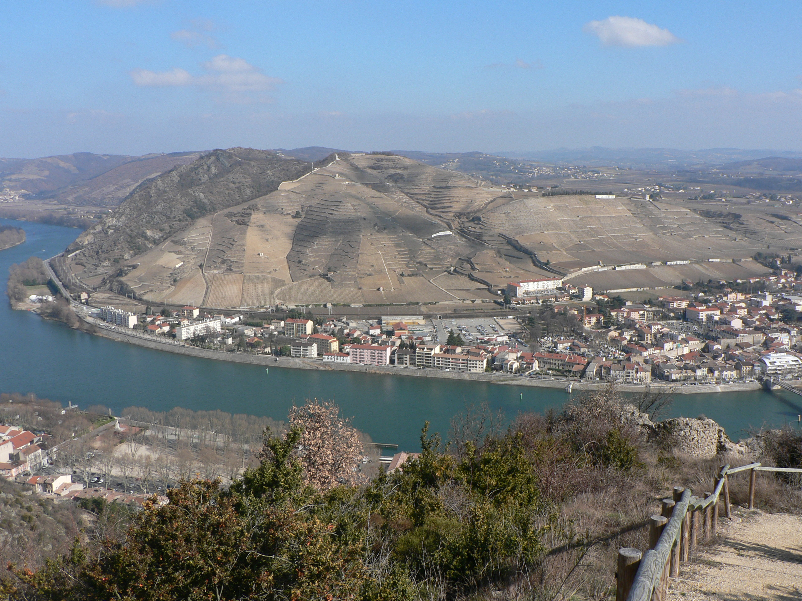 La colline de l'Hermitage vue depuis les hauteurs de Tournon